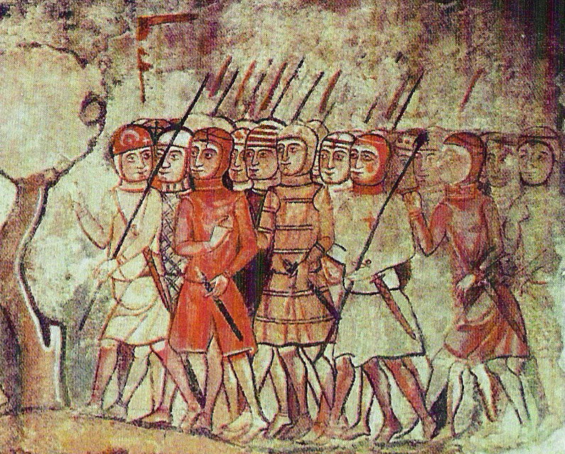 possiblement almogàvers a la conquesta de mallorca